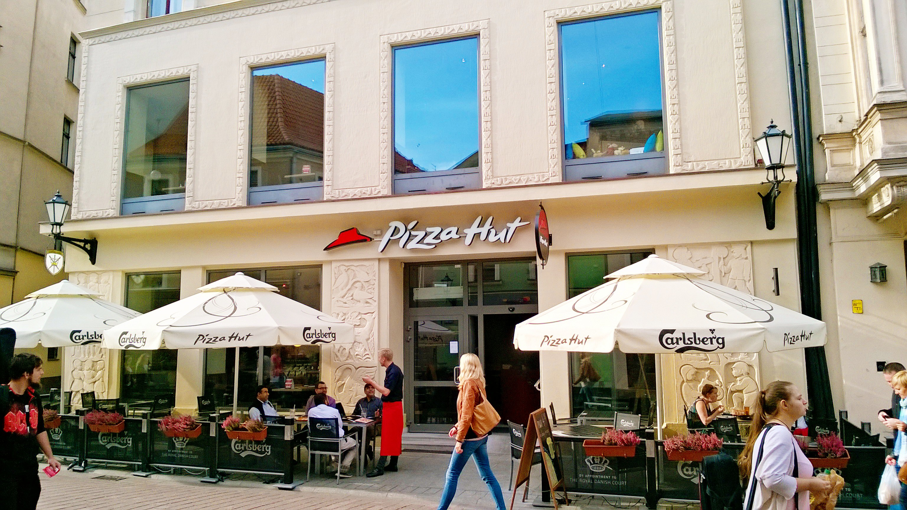 Pizza Hut w Toruniu